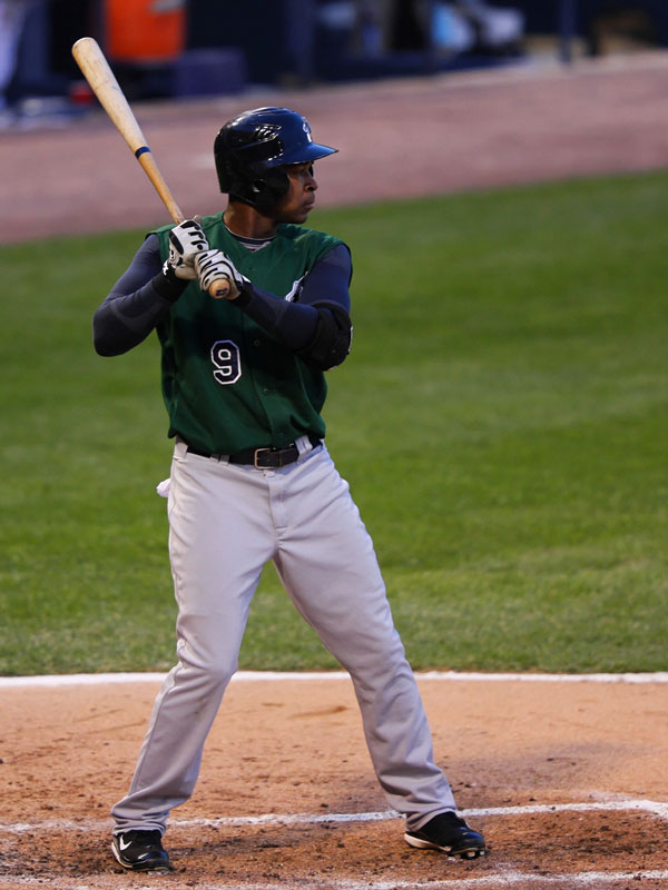 Gookie Dawkins, May 2009, Scranton, PA. 19:35, 22 May 2009 . . BubbaFan . . 600×800 (81 KB)